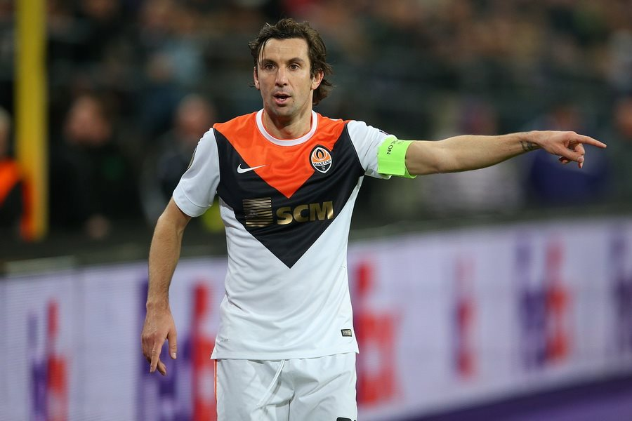 Срна у матчі проти Андерлехта, 2016 рік